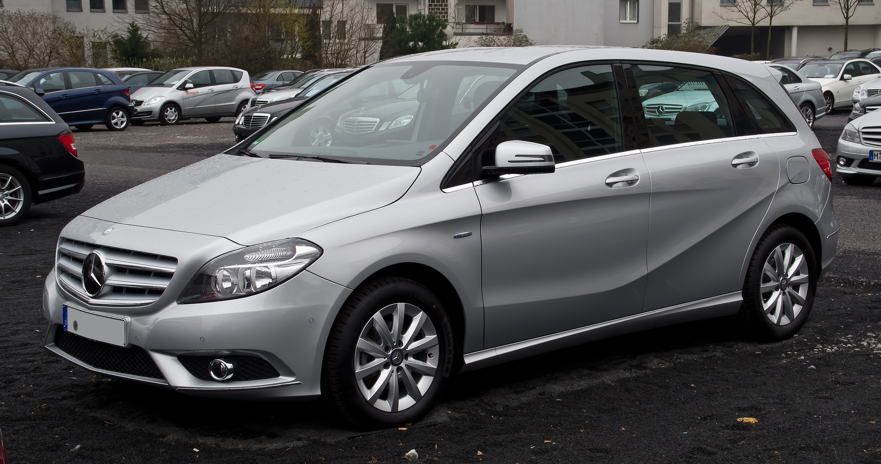 Mercedes-Benz B 180 BlueEFFICIENCY (W 246)